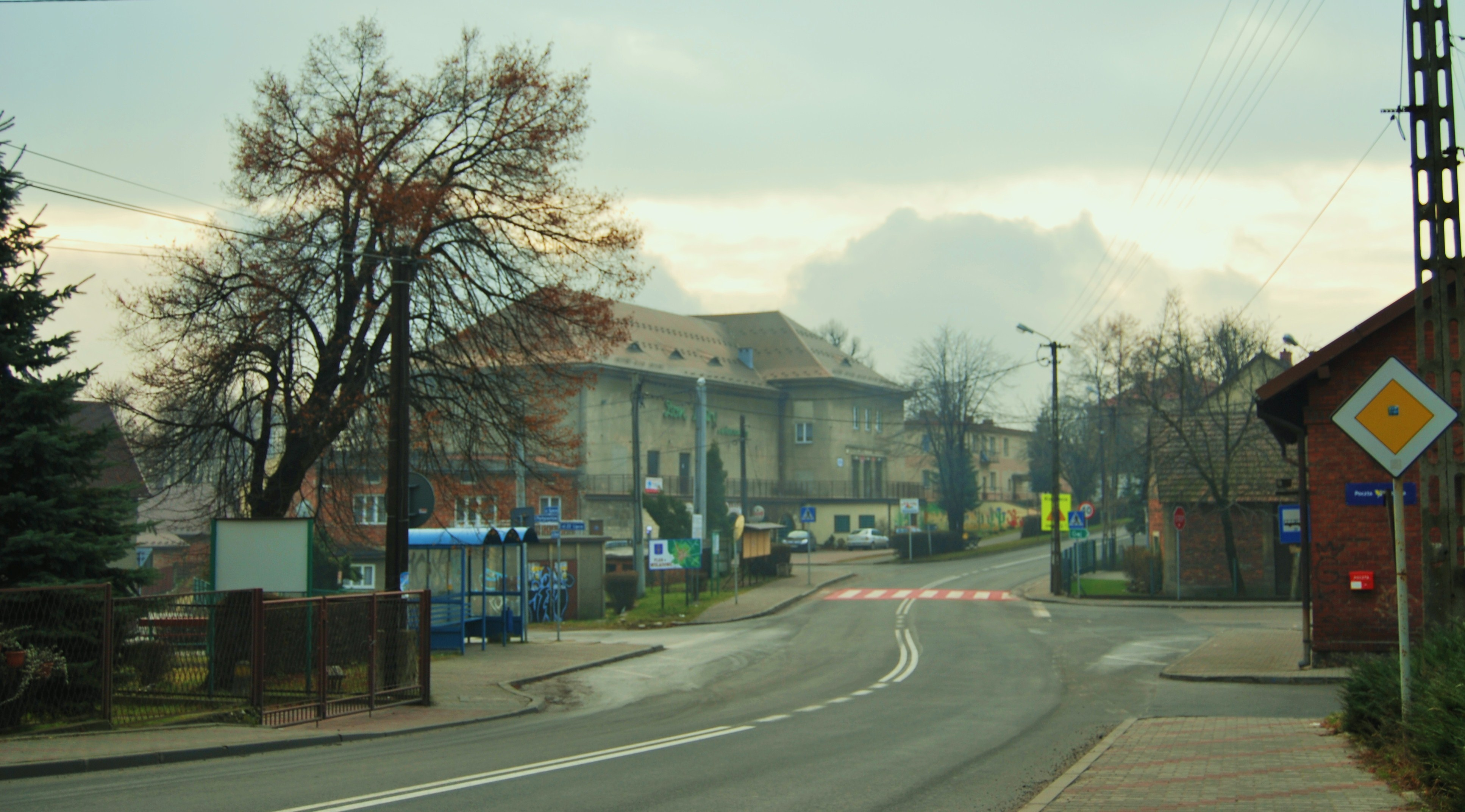 Myślachowice; centrum, droga wojewódzka 791. Grudzień 2009 r.